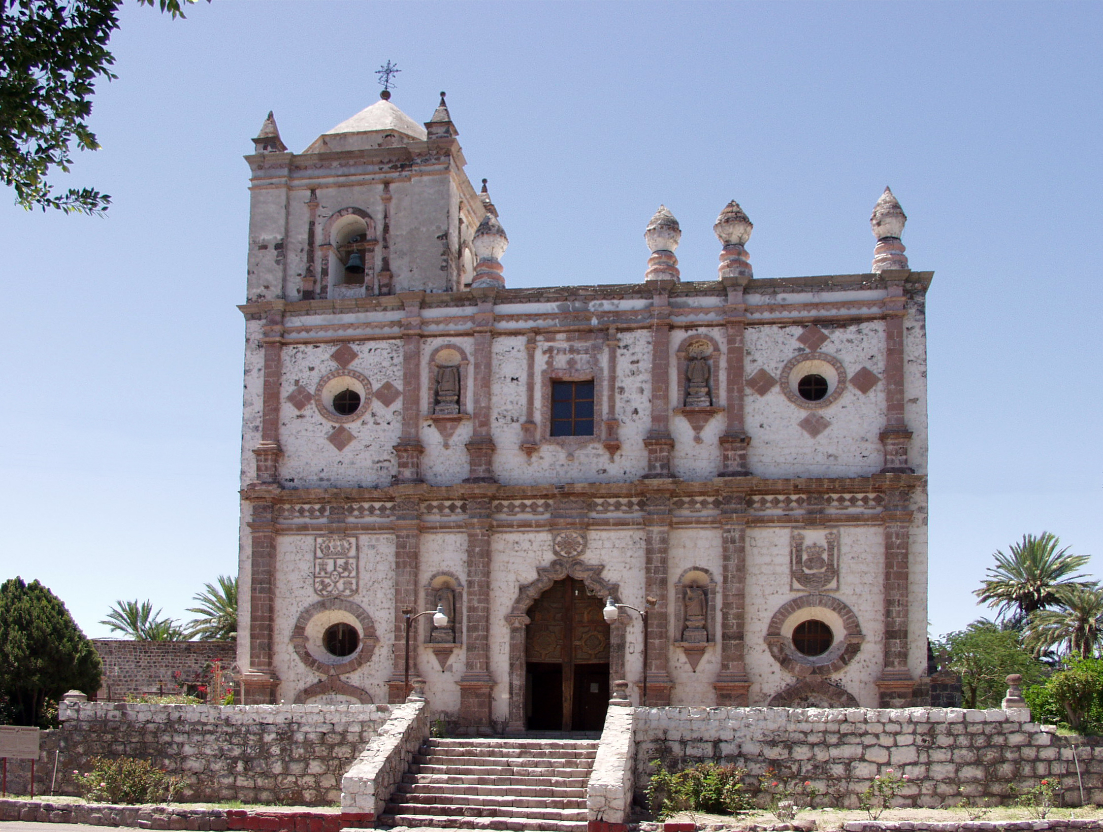 Misión San Ignacio Kadakaamán - San Ignacio Mission. In San Ignacio, Baja California Sur, Mexico